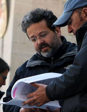 Alfredo Peyretti